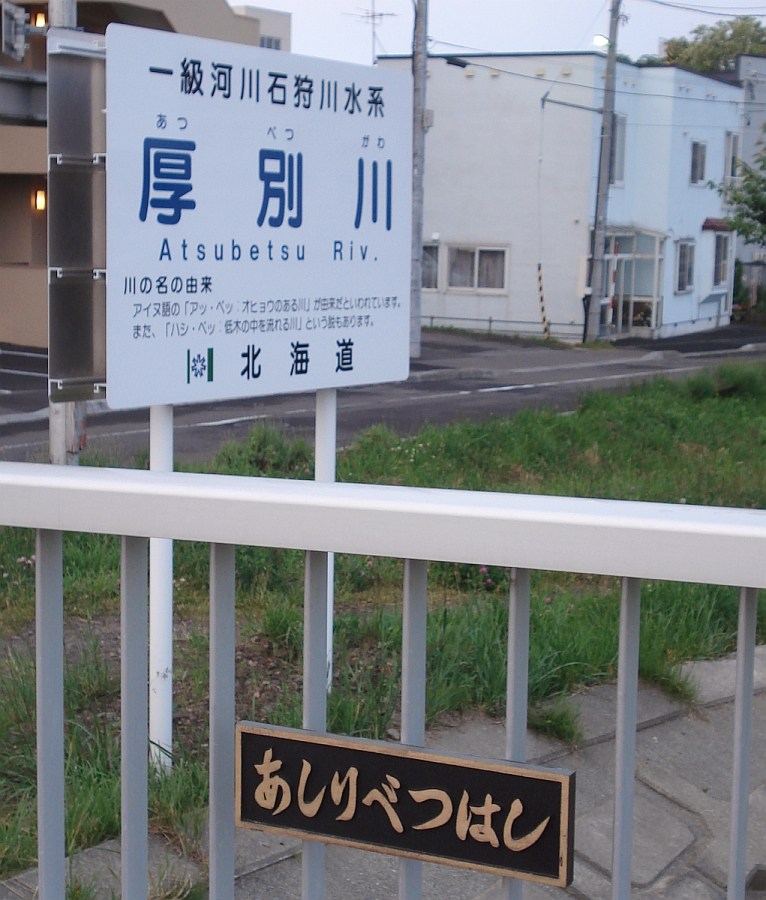 北海道・札幌市南区・清田区・厚別区・白石区・江別市を流れる厚別川。厚別（あつべつ）川にかかる厚別（あしりべつ）橋